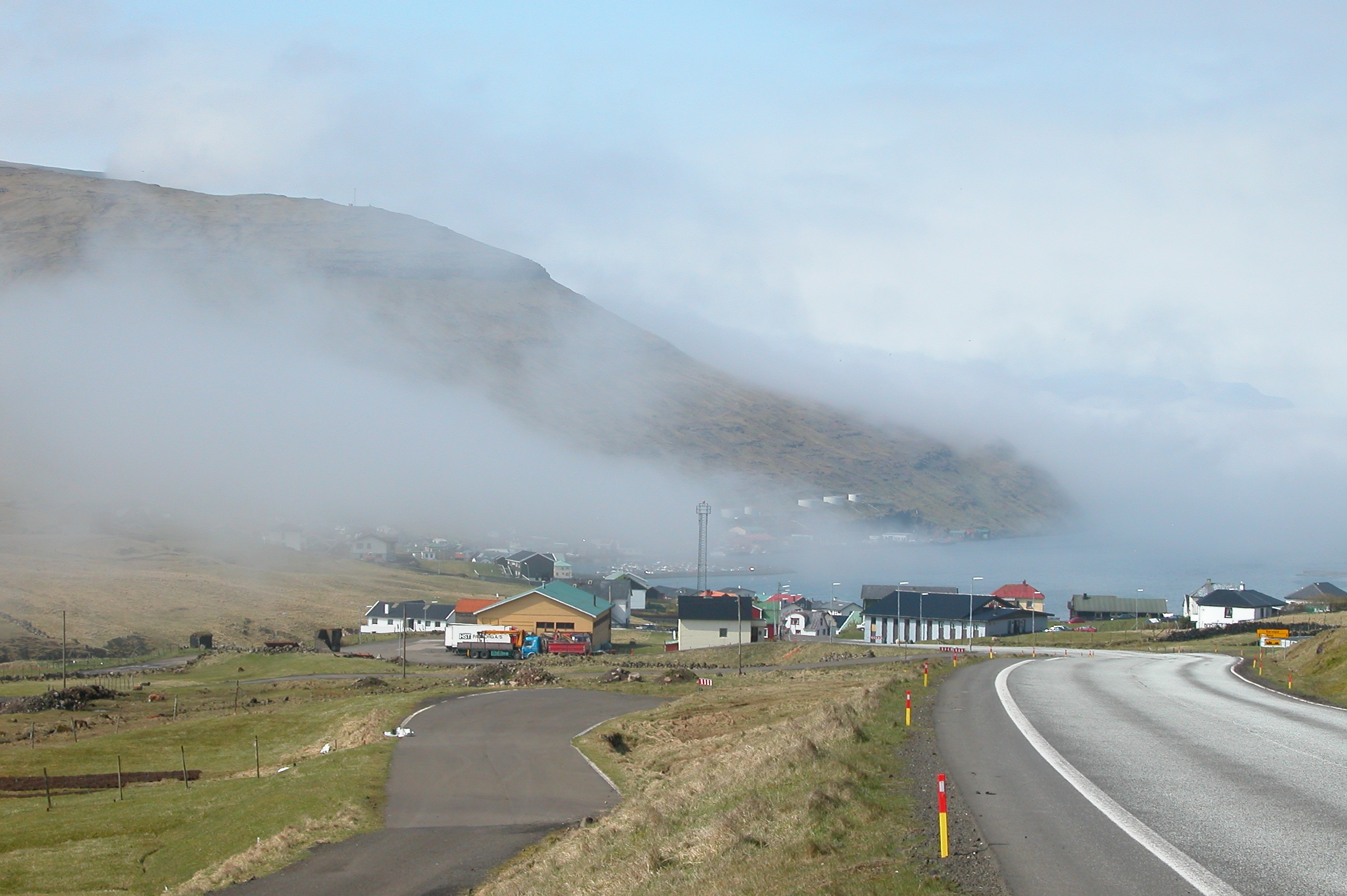 Sørvágur on Vágar, Faroe Islands.